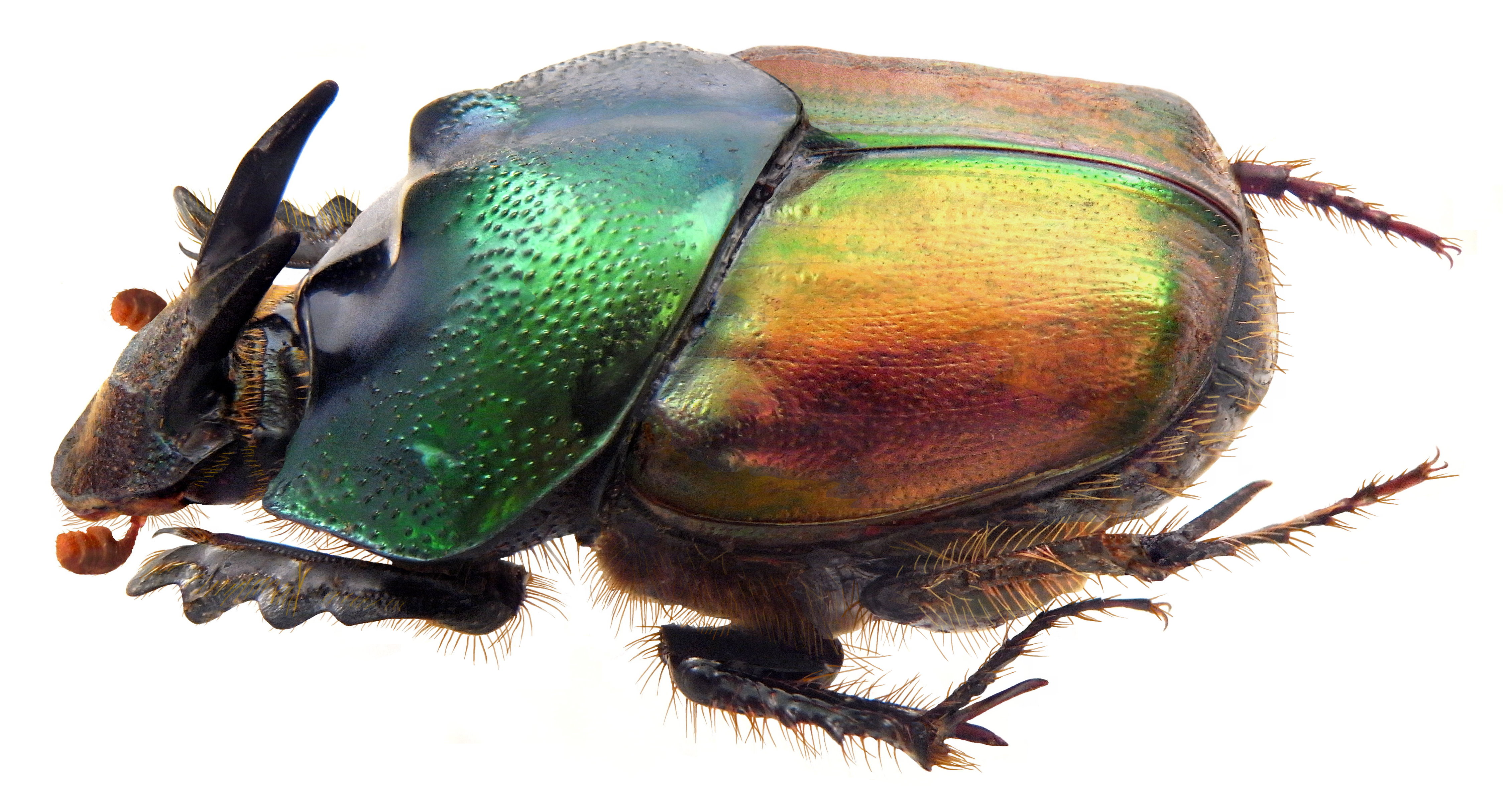 Familie: Scarabaeidae Groesse: 11 mm Fundort: Indien, State Shimoga, Mysore leg. P.S.Nathan, 1936; det. J.Scheuern, 1997 Photo: U.Schmidt, 2009